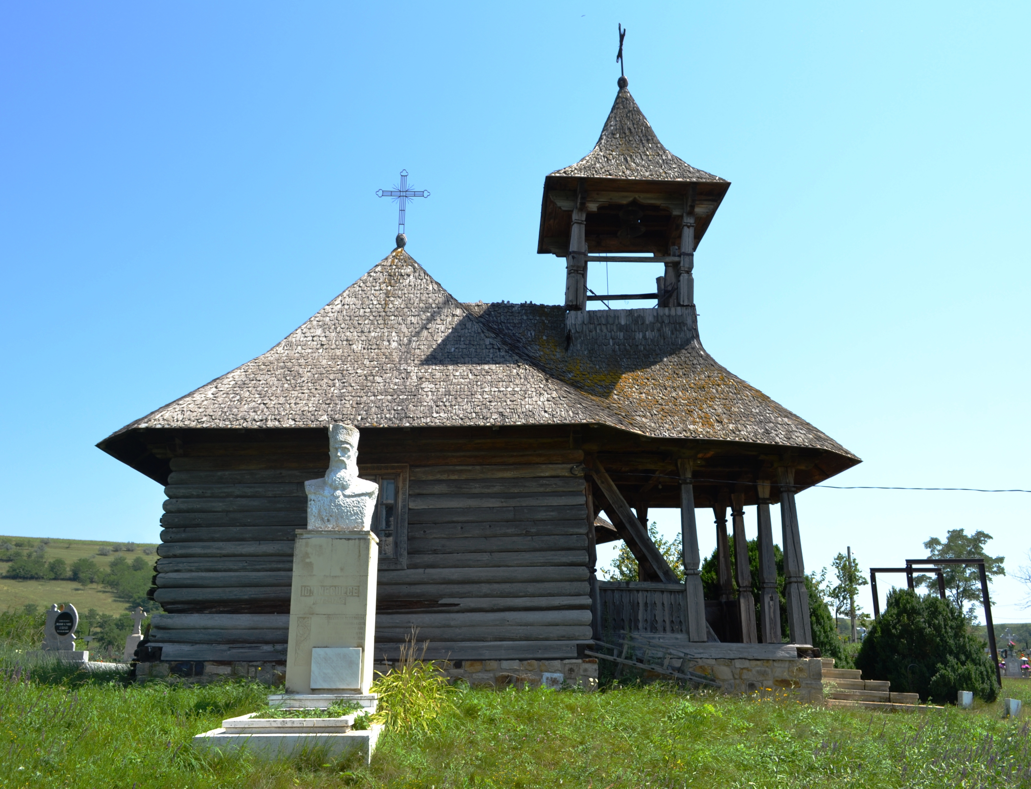 Mormântul cronicarului Ion Neculce din satul Prigorenii Mici, comuna Ion Neculce - jud. Iasi. In plan secund, biserica de lemn din fostul sat Prigorenii Mici (Ion Neculce), jud. Iasi